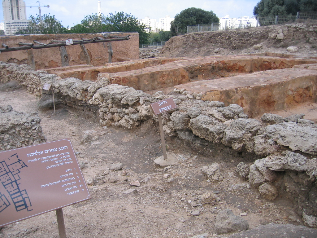 Eretz Israel Museum, Tel Aviv, Israel.